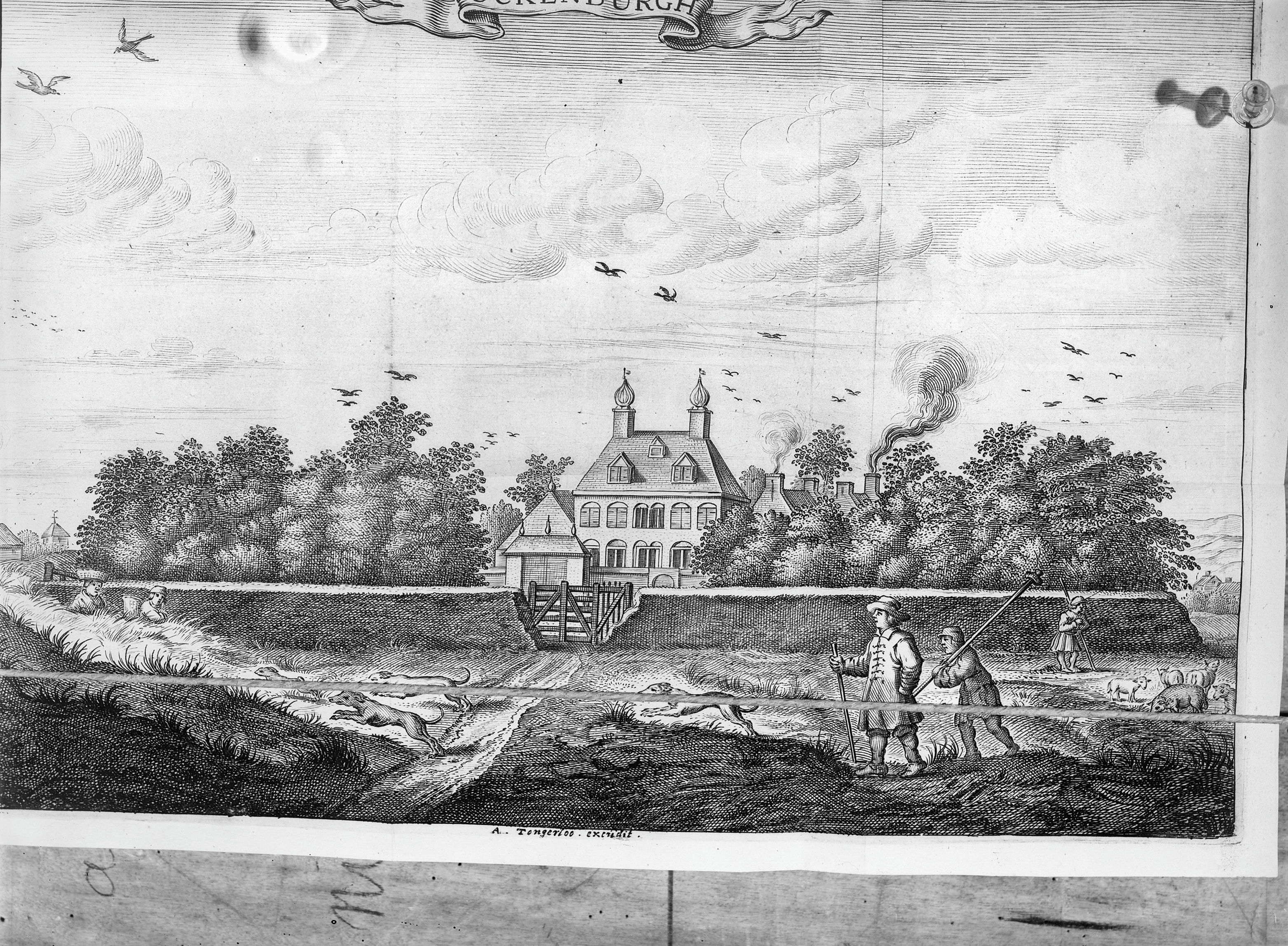 Huis Ockenburg: pl.m. 1650 naar prent